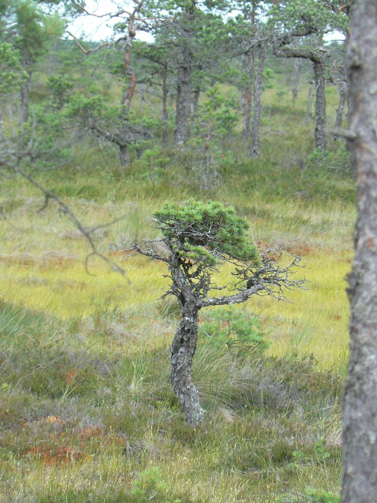 Rabamänd